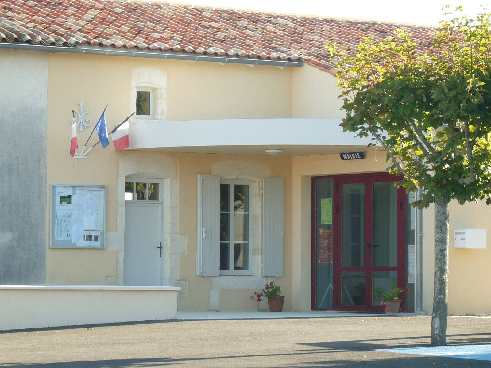 mairie de St-Dizant-du-Bois (17), France